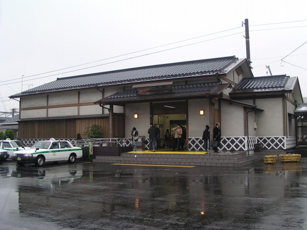 東海道本線・原駅